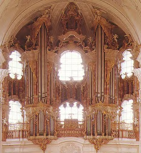 orgel weingarten.